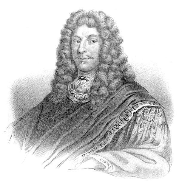 Claes Rålamb (1622-1698)